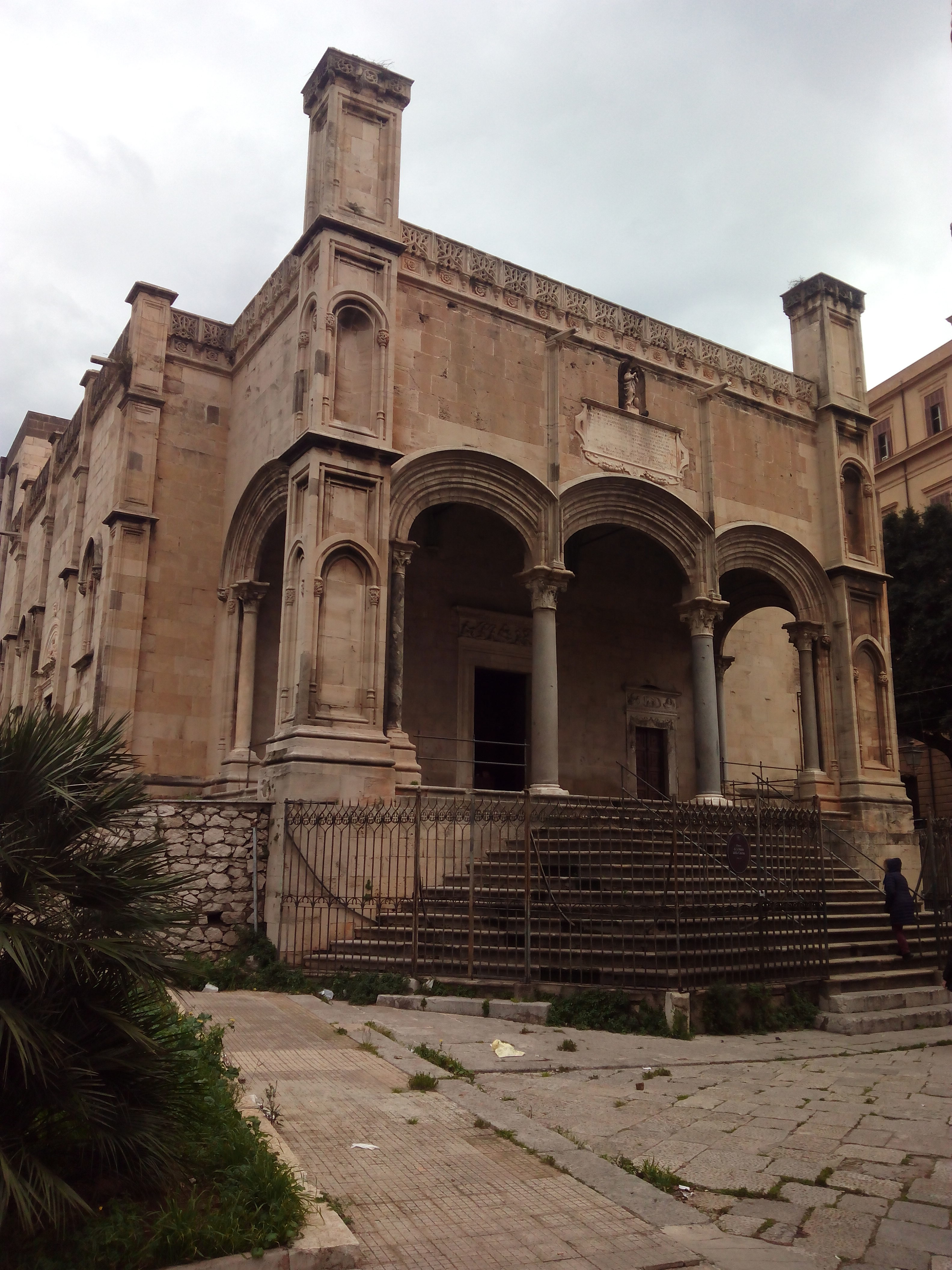 Santa Maria de la Catena eliza